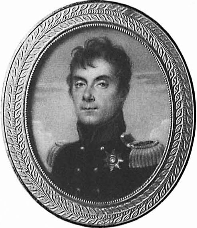 Граф Алексей Андреевич Аракчеев (1769-1834)